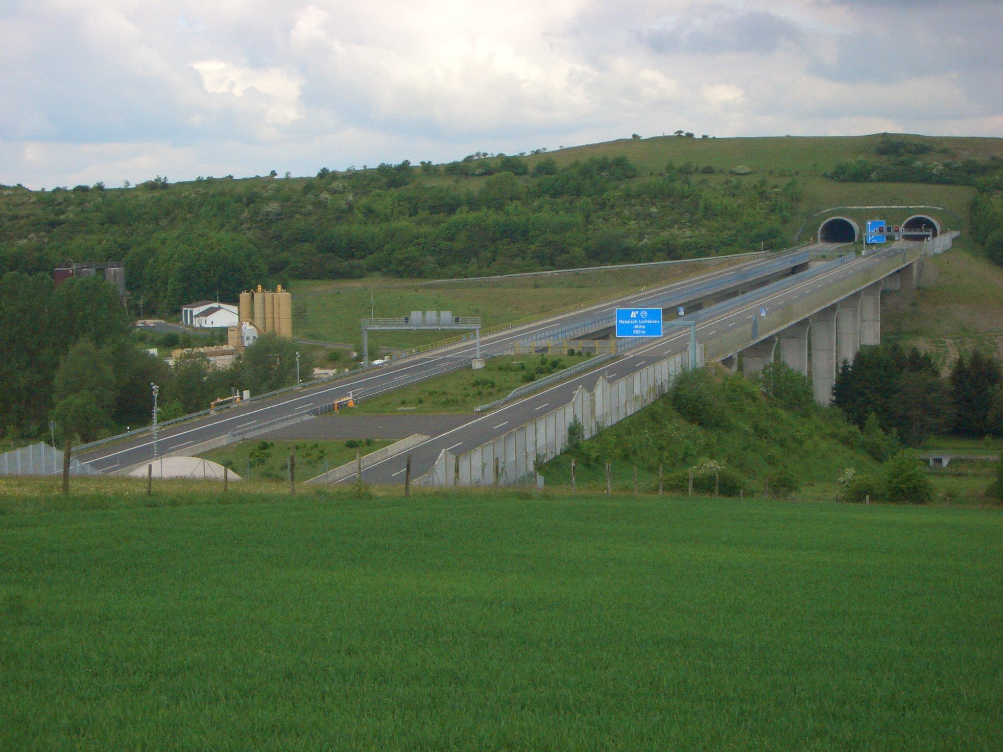 Blick auf den Tunnel Hopfenberg und die Hopfenbachtalbrücke.